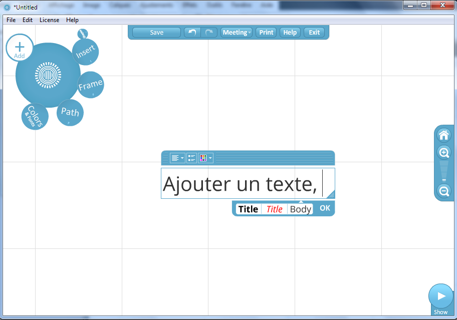 Interface du logiciel Prezi